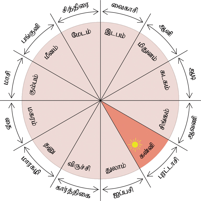 Drawn by the user who uploaded it here.